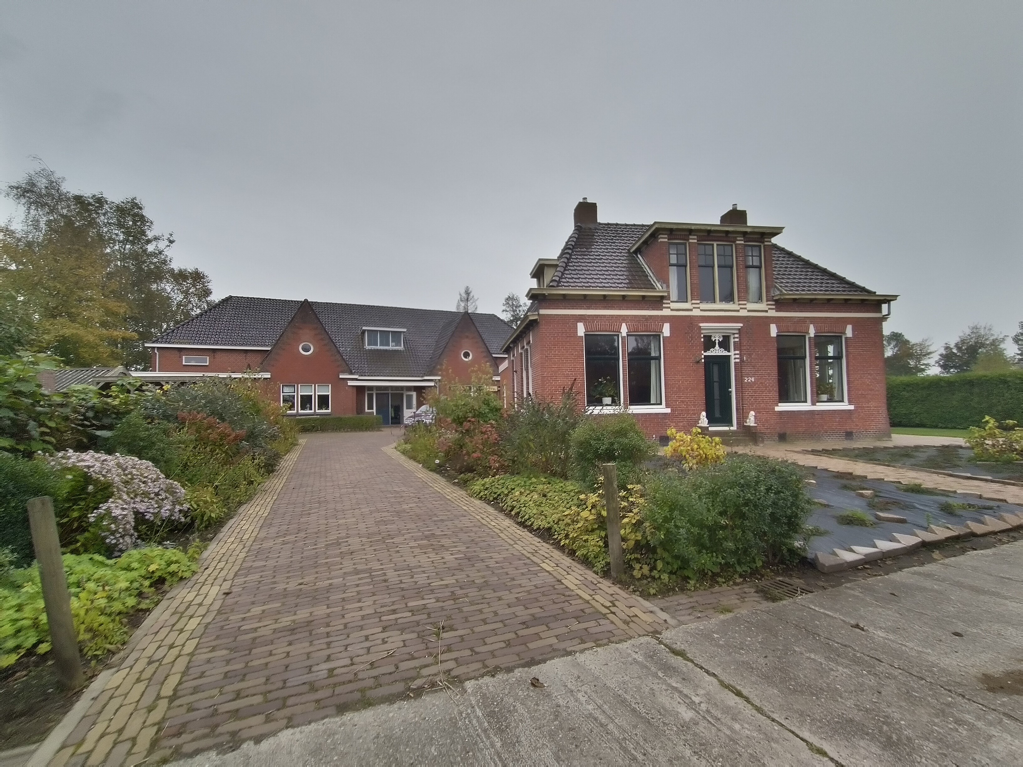 Voormalig schoolgebouw van christelijke daltonschool De Oleander te Oostwold, Westerkwartier, Groningen.